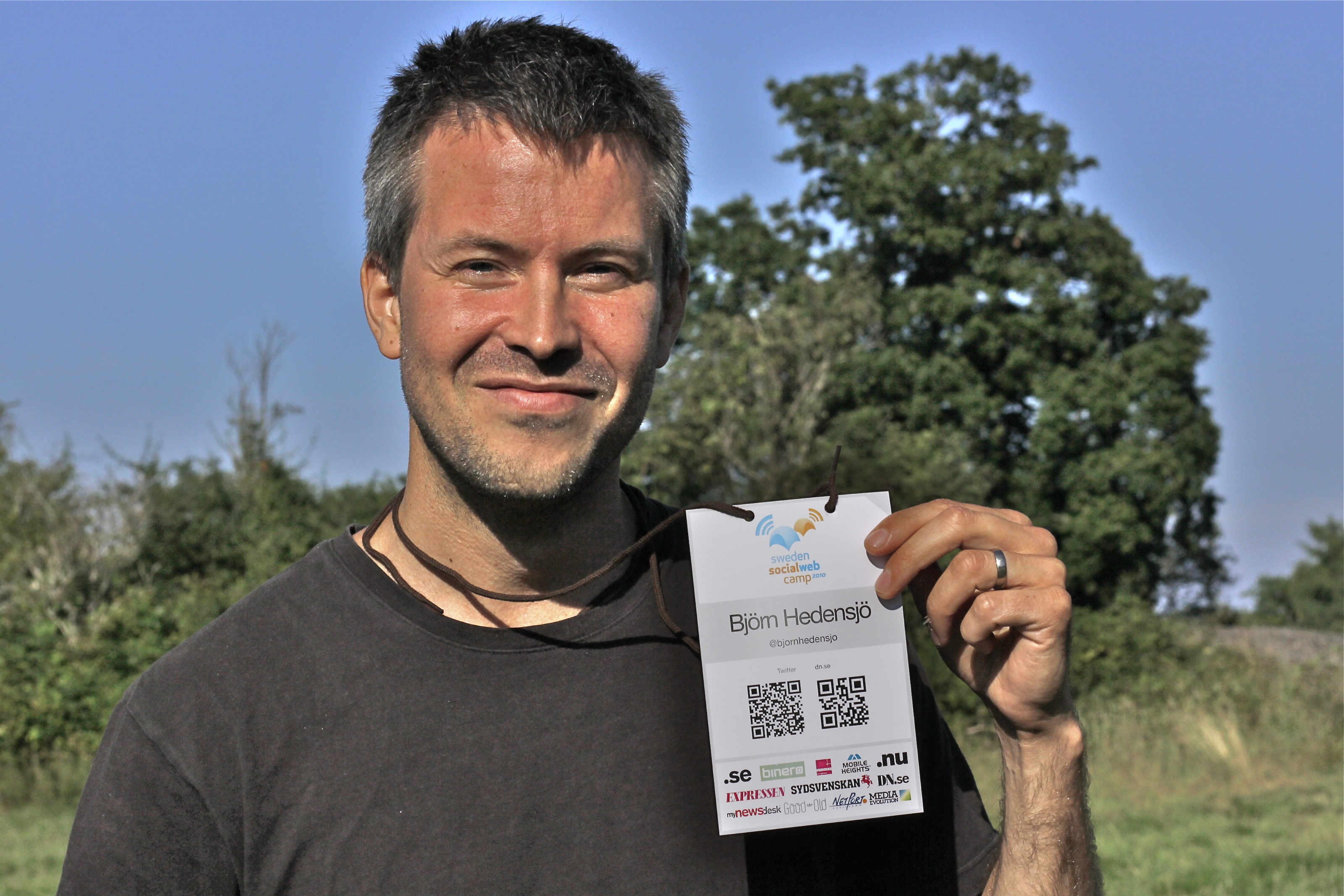 Björn Hedensjö på SSWC.